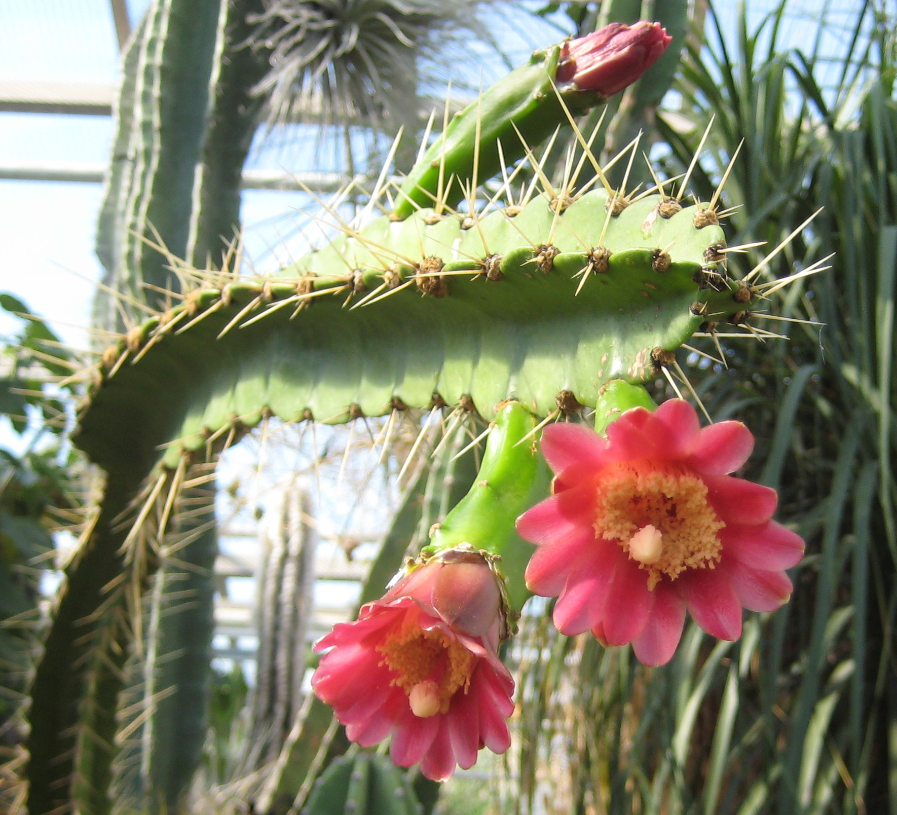 Calymmanthium substerile im Botanischen Garten Dresden